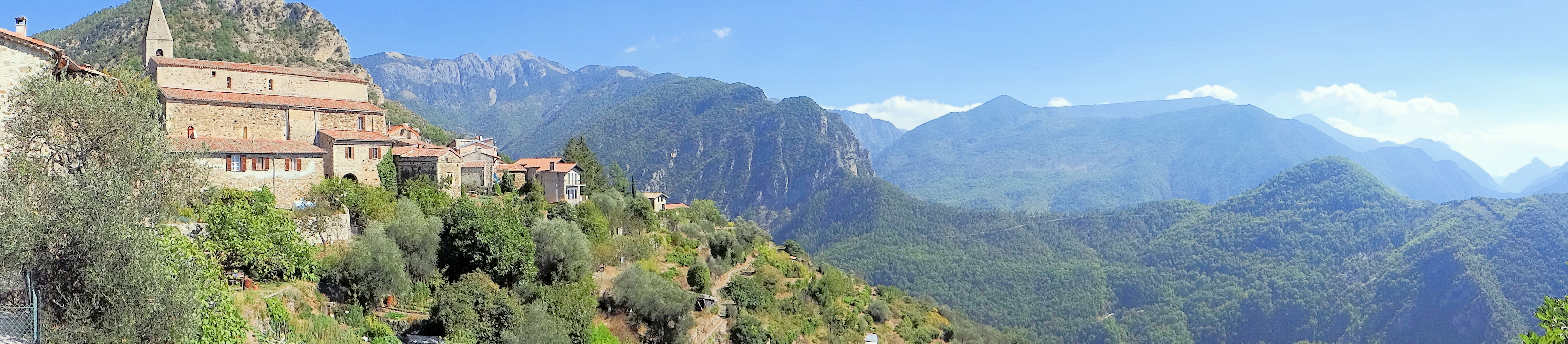 La Tour (Alpes-Maritimes) - Panorama vers l'est, l'église et la maison dite des Templiers